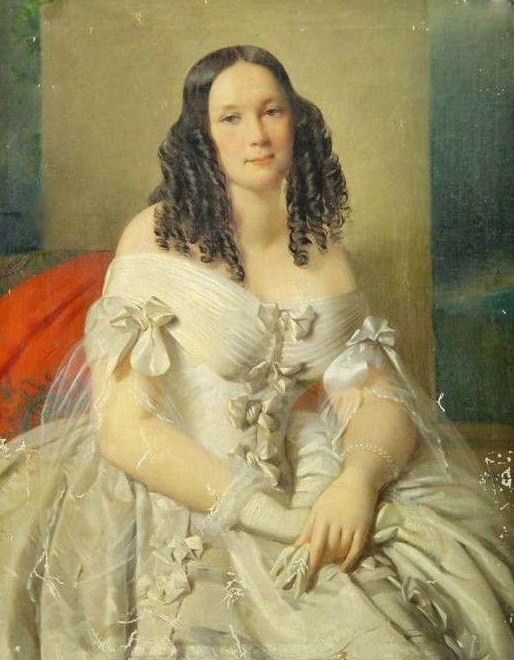 Княгиня Наталья Александровна Вяземская, ур. Моршанская (ум. 1876)